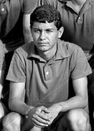 Мирча Луческу